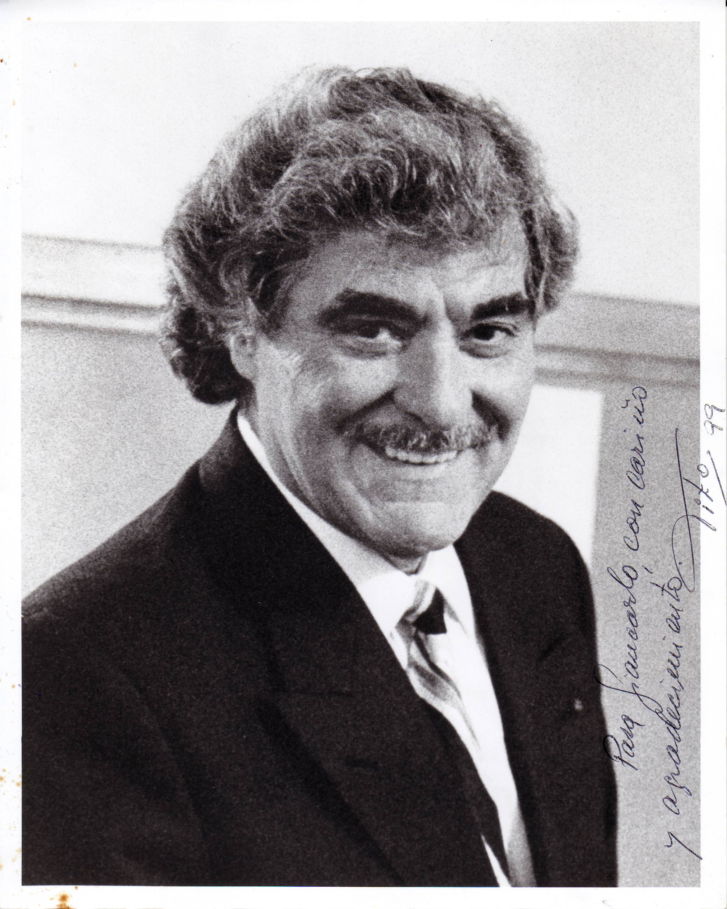 Tito Capobianco (1999)